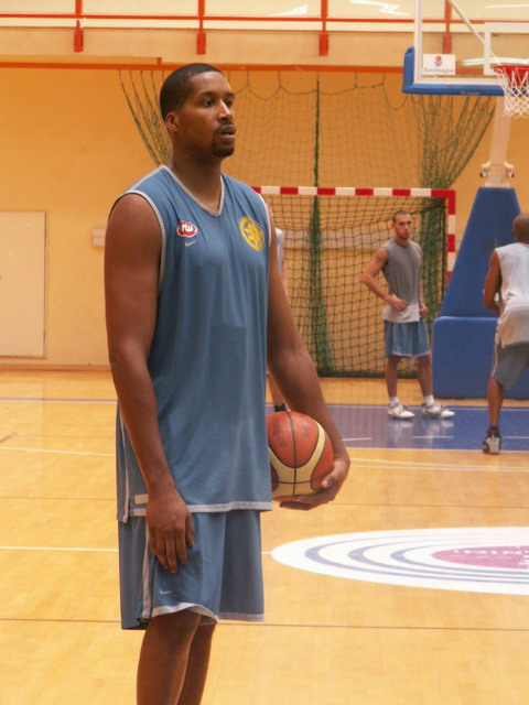 ג'יימי ארנולד, באימון בהדר-יוסף, תחילת עונת 2005/6